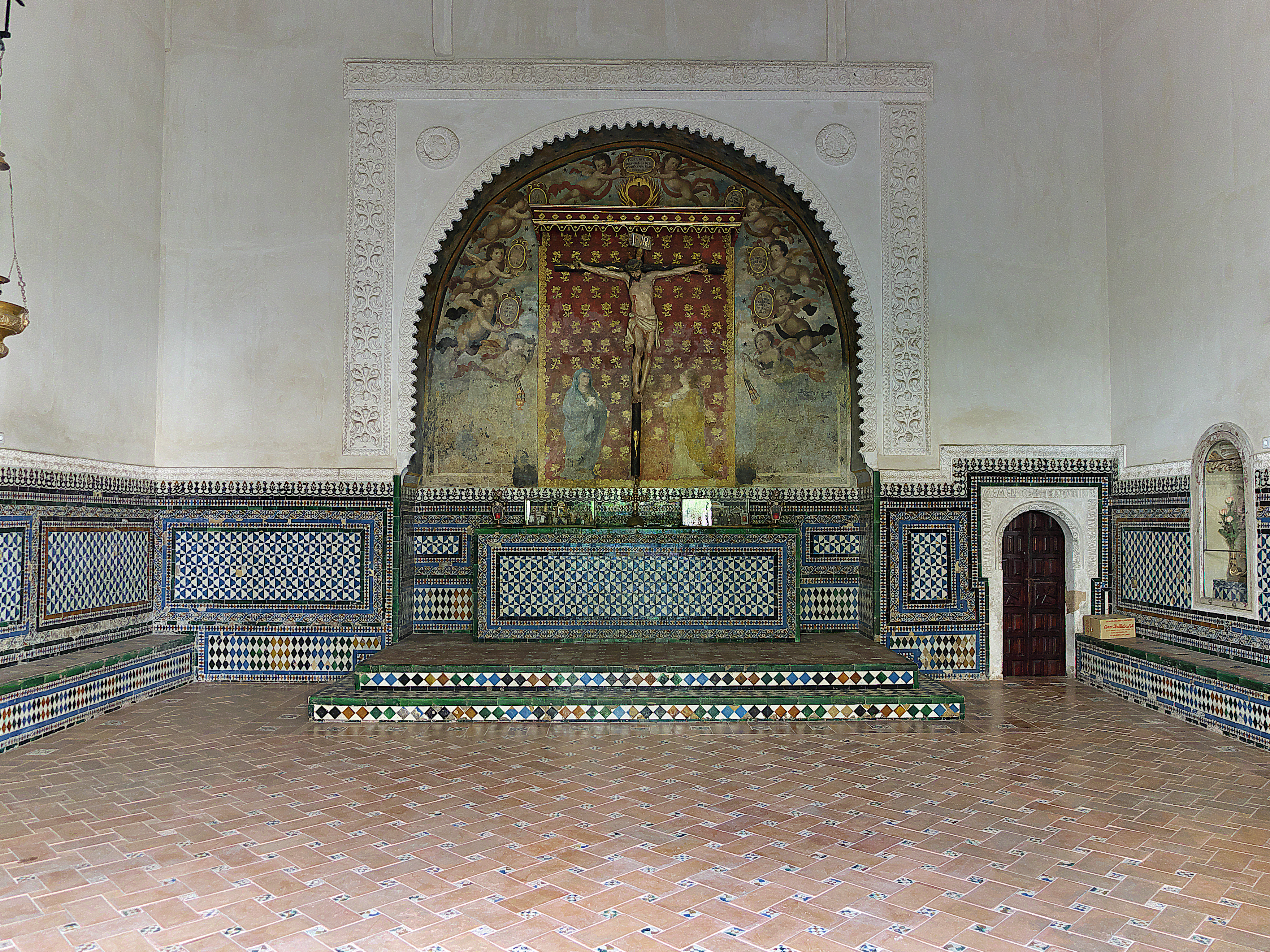 Convento de Santa Inés (Sevilla). Antigua capilla de don Alfonso Fernández Coronel. Su planta cuadrada, yeserías, los alicatados y en especial, su bóveda, tipología de qubba, presenta un valioso ejemplo de la arquitectura mudéjar en Sevilla. El crucificado, de autoría discutida, tardogótico, podría datarse a mediados del XVI.